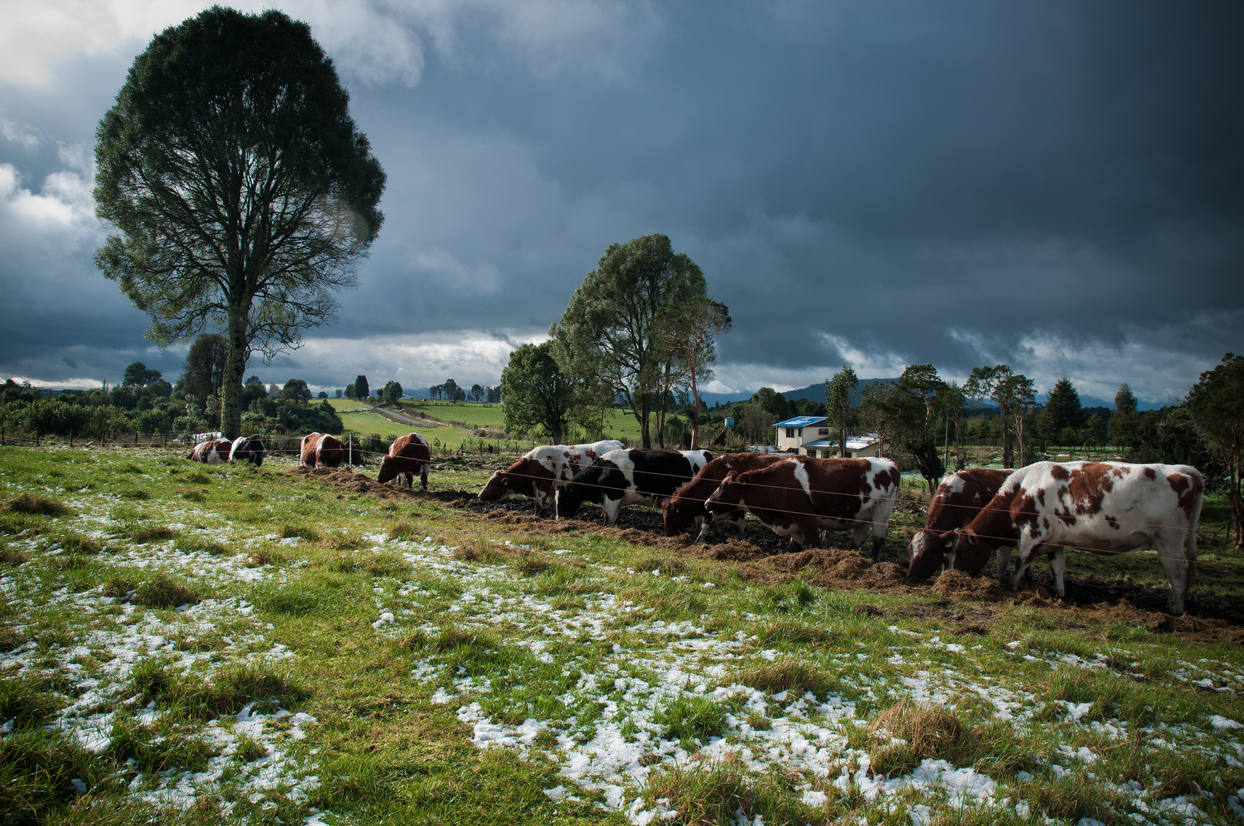 Cattle grazing in the Rupanco area.